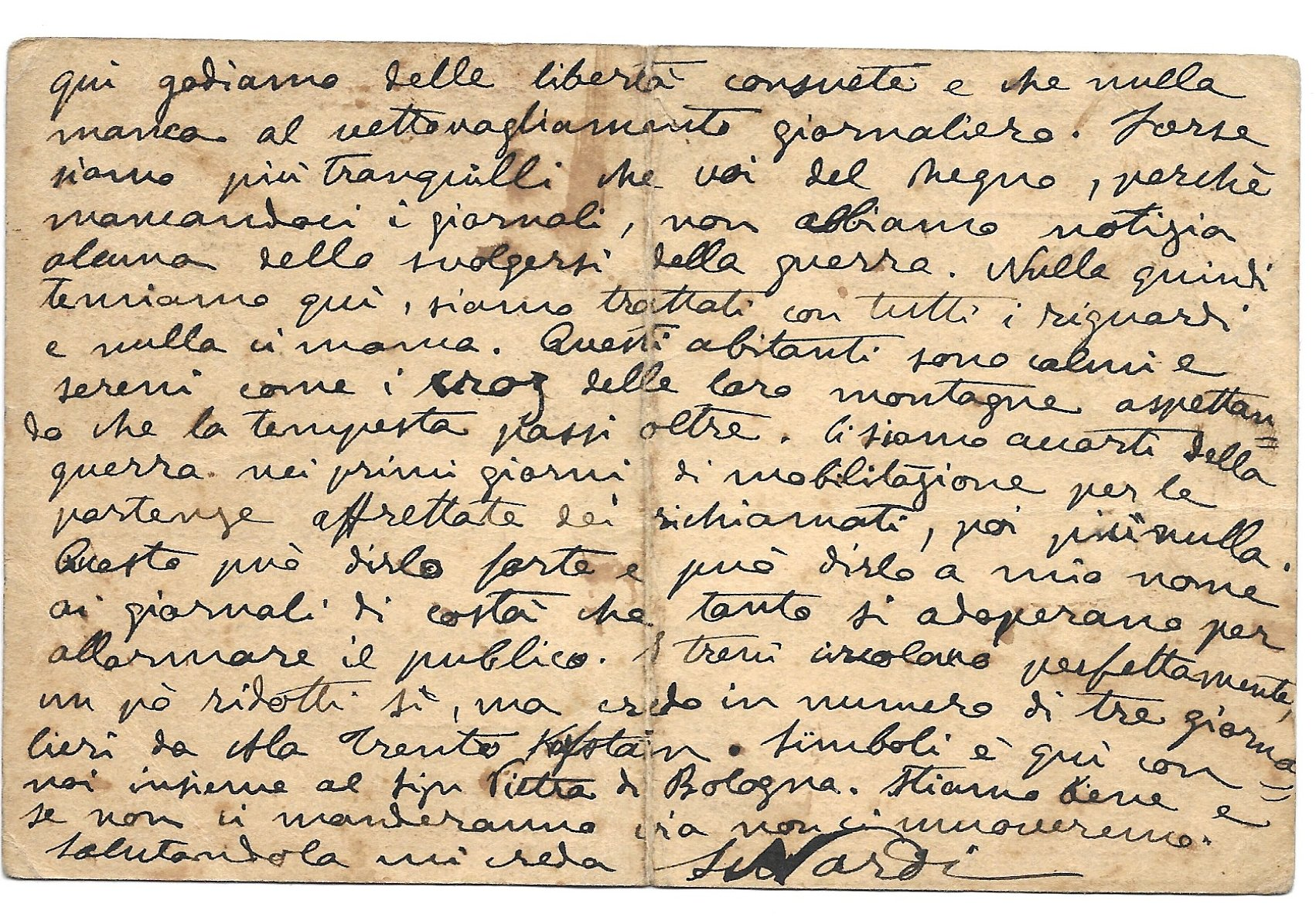 Cartolina postale spedita da Tuenno da Sigismondo Nardi a Antonio Mosca via Castiglione 39 Bologna